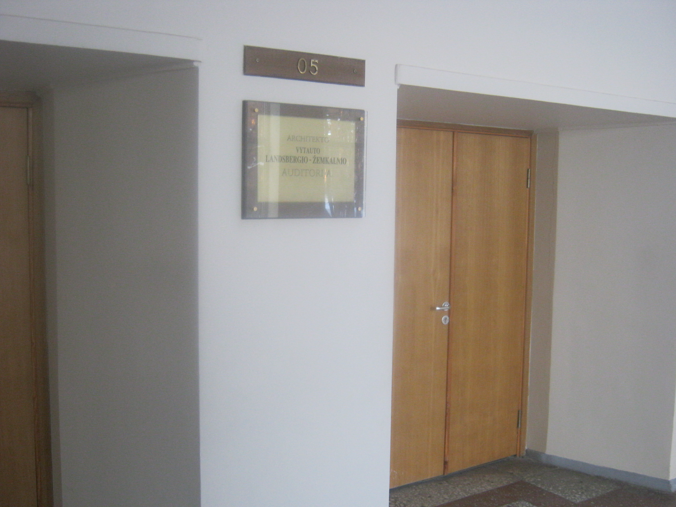 Architekto Vytauto Landsbergio-Žemkalnio auditorija